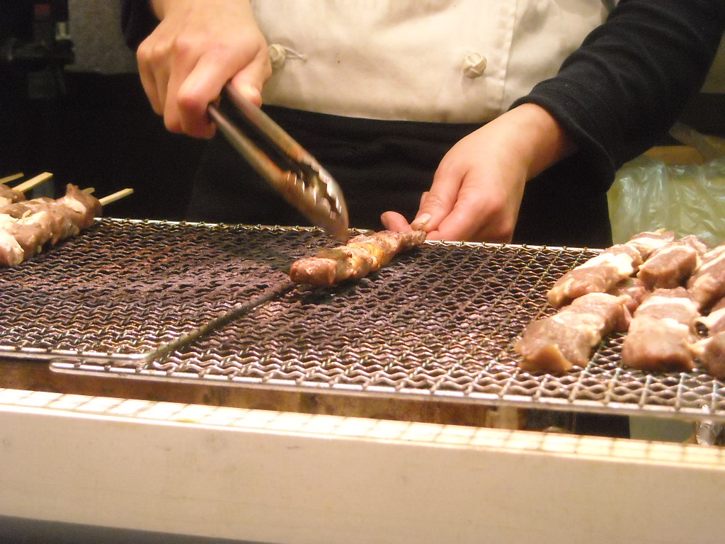 牛串。札幌市内にて。 Nikon Coolpix L16